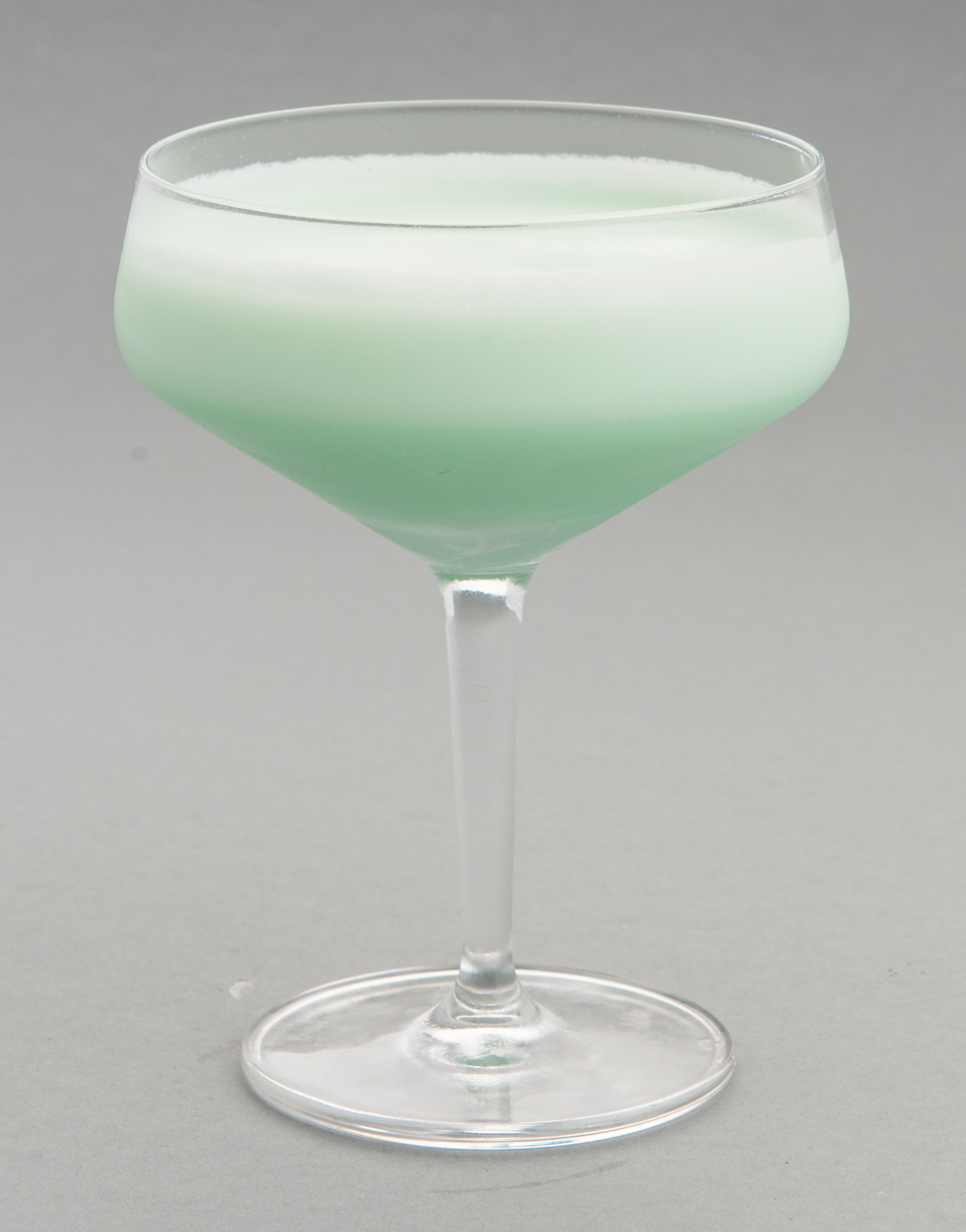 Grashopper ist ein süßer, alkoholischer Cocktail mit Minzgeschmack